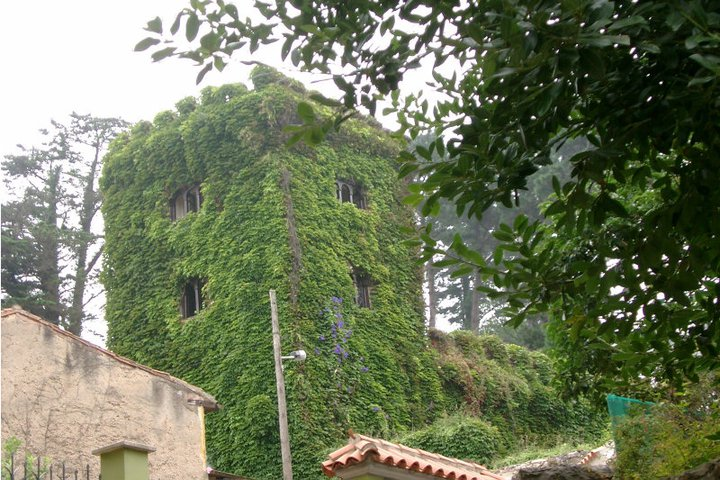 Torre de la Atalaya (Ribadesella)